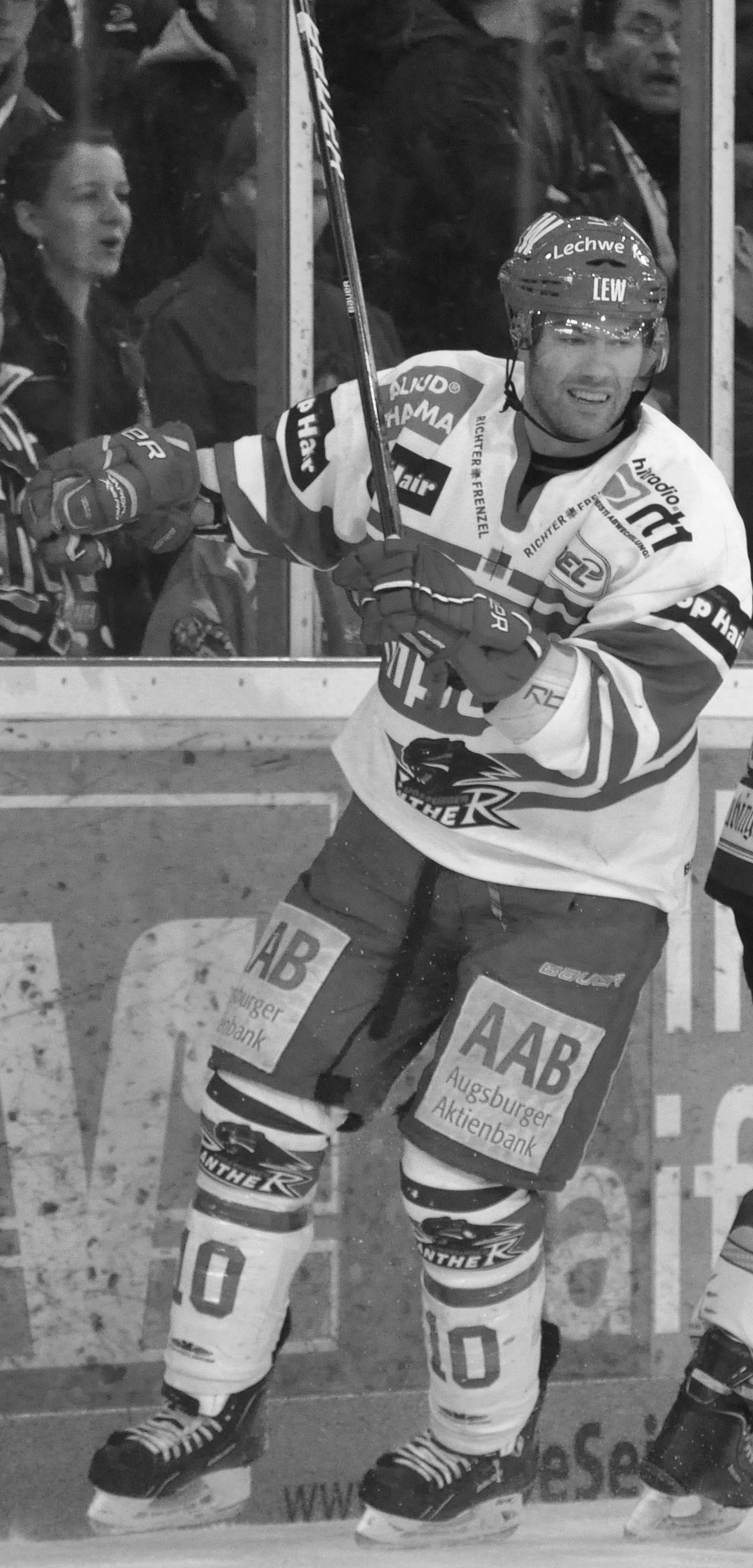 Straubing Tigers - Augsburg Panther 04.03.2012 DEL Deutsche Eishockey Liga